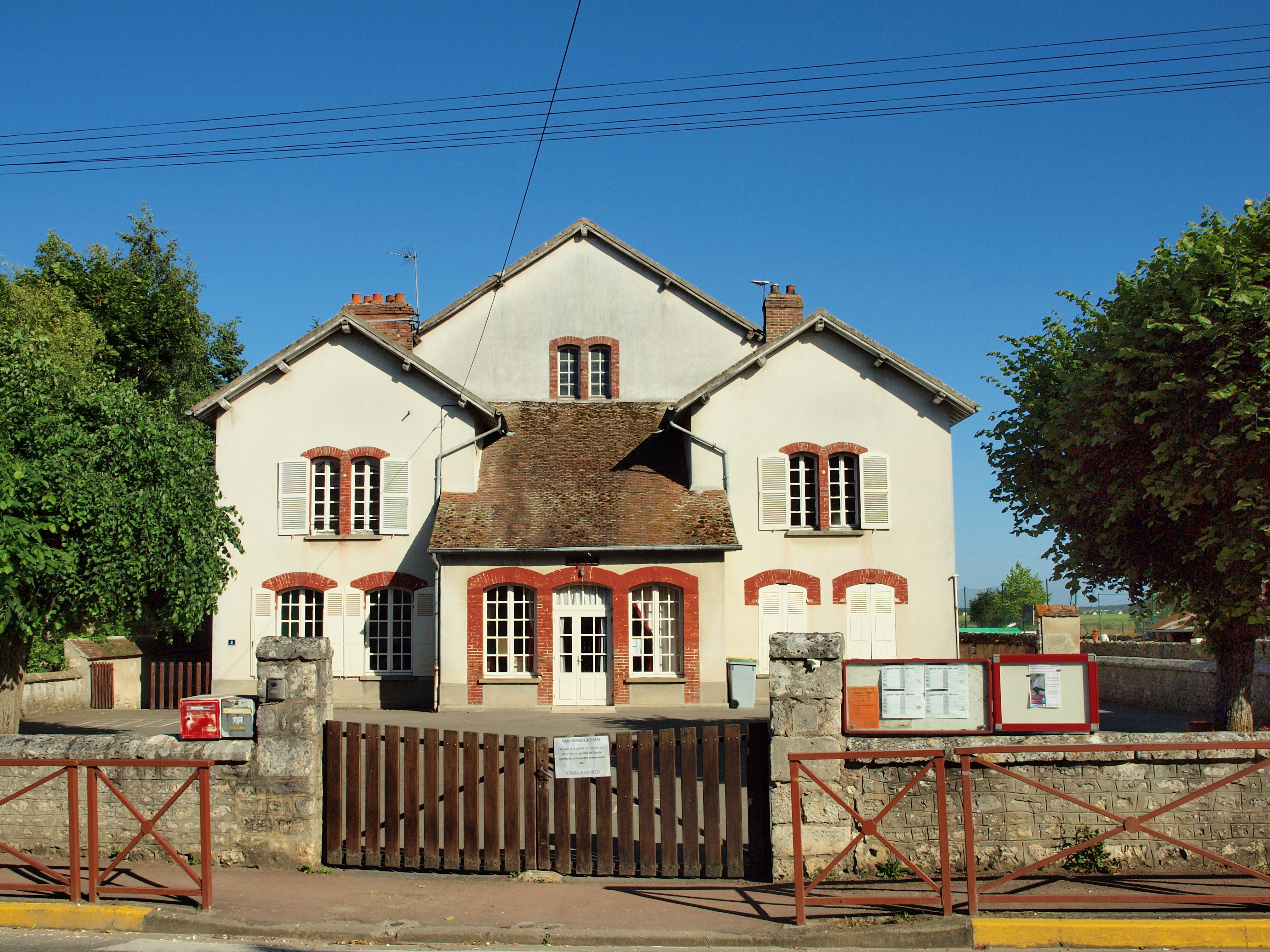 École de Chaintreaux